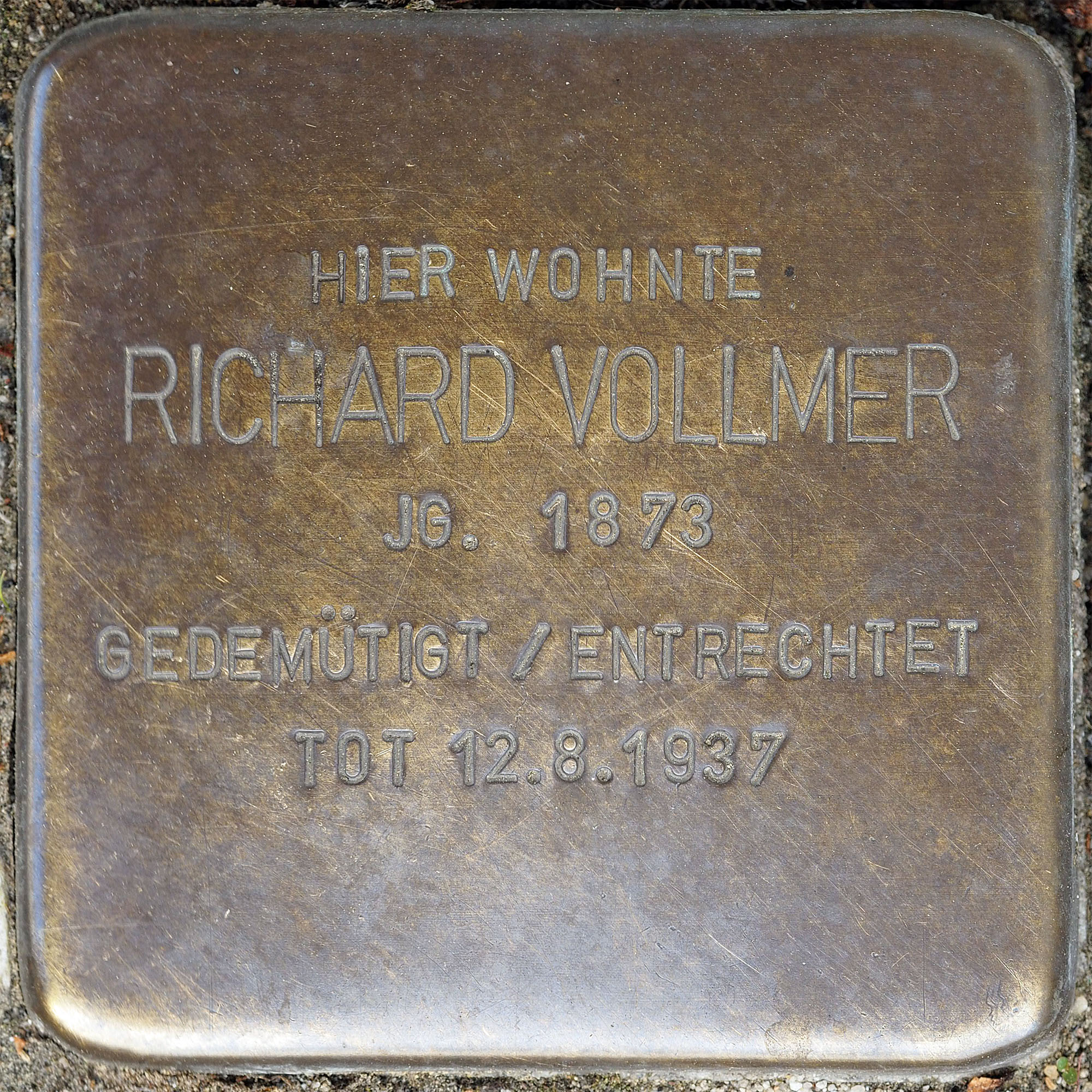 Stolpersteine MG: Vollmer, Richard